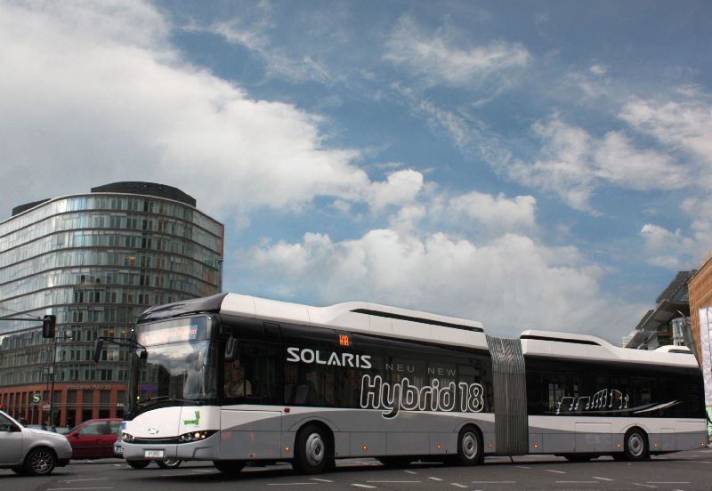 18 Hybrid Vossloh